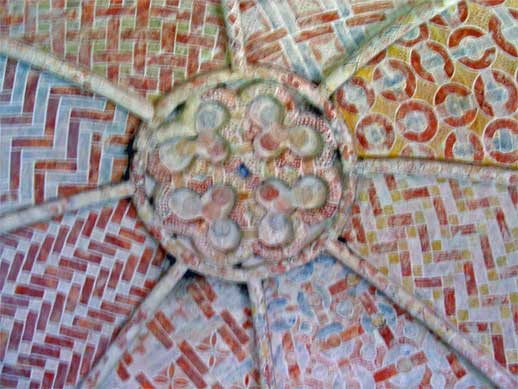 Gewelf in de Mariakerk van Krewerd